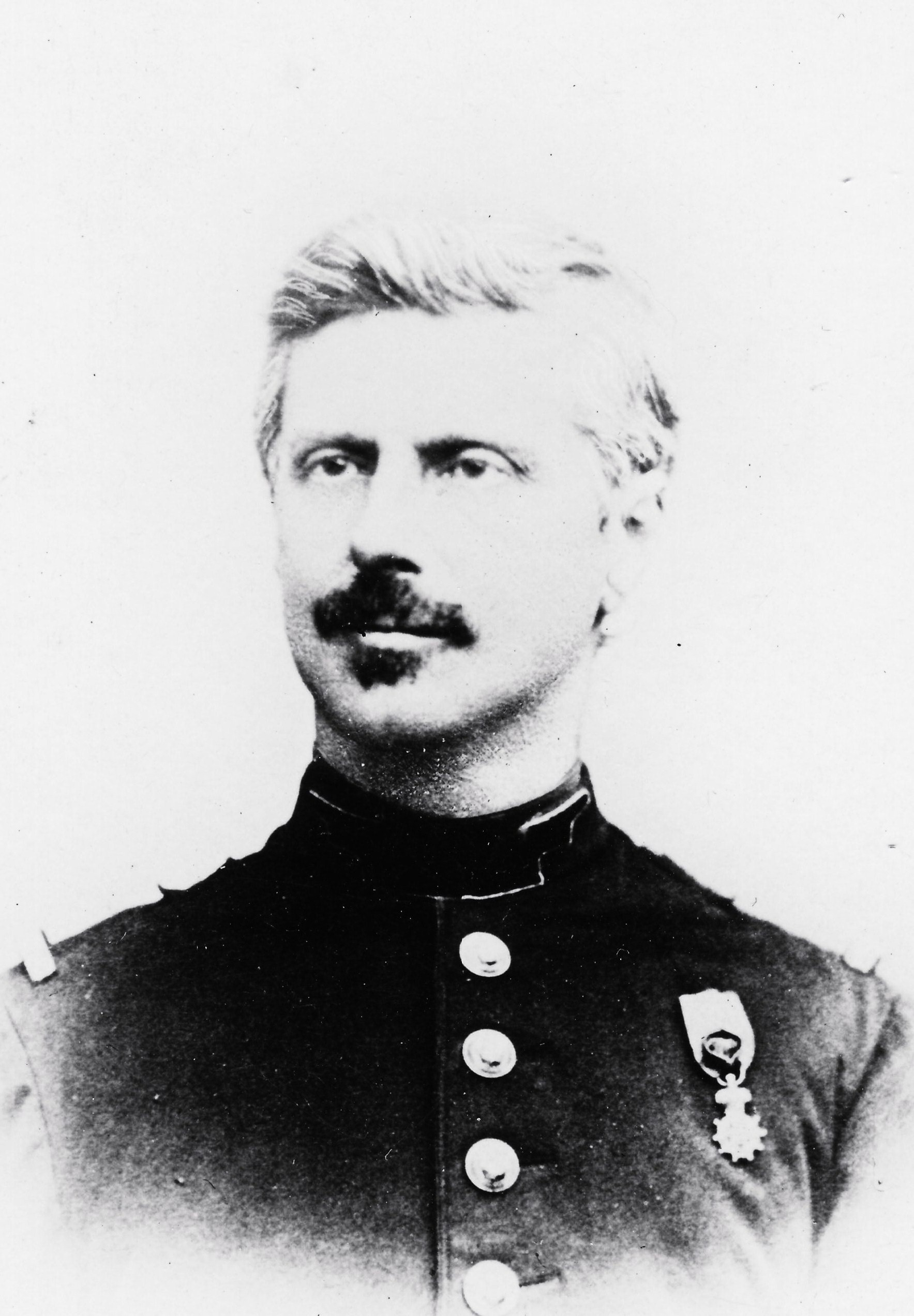 Photo de Mamès Cosseron de Villenoisy vers 1870